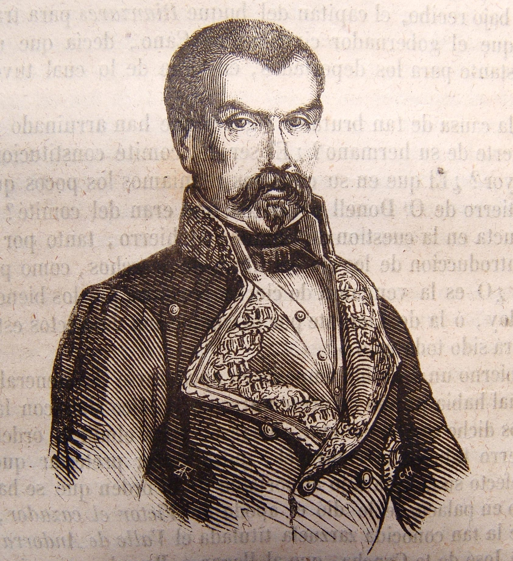 La revolucion de Julio en Madrid.../ obra ilustrada por Antonio Ribot y Fontseré. Ilustración en página 56. Puede acceder al texto completo de la obra en el siguiente enlace : La revolucion de Julio en Madrid : reseña de los hechos que constituyen este glorioso alzamiento, precedida del exámen razonado de las causas que lo han producido, y seguida de la exposicion de los principales sucesos que se han desenvuelto simultaneamente en el resto de España .. - Madrid : Gaspar y Roig, 1854